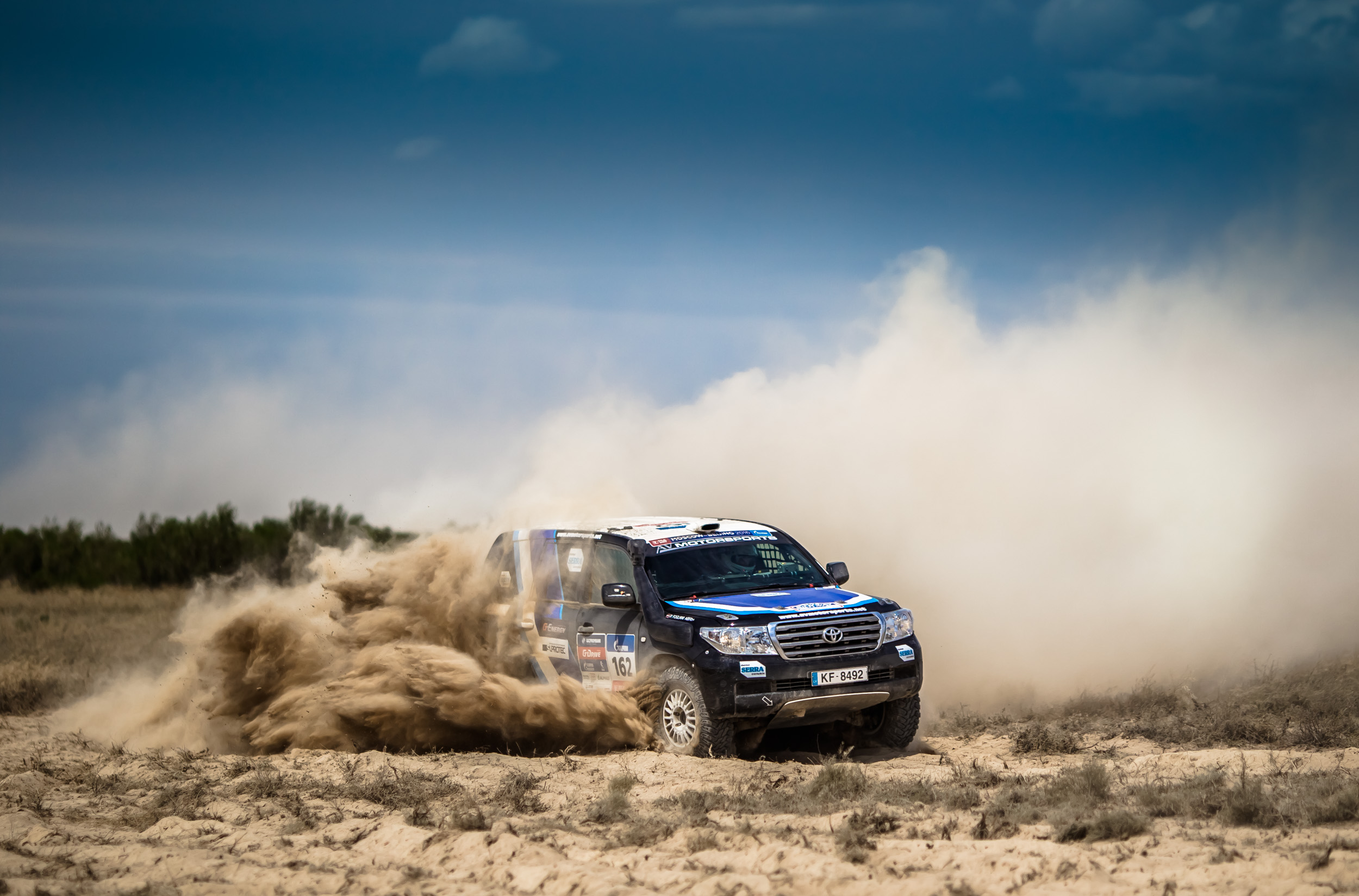 Автомобиль зачетной группы Production (Т2) - серийные машины с минимальной доработкой на трассе ралли-марафона "Шелковый путь 2016"